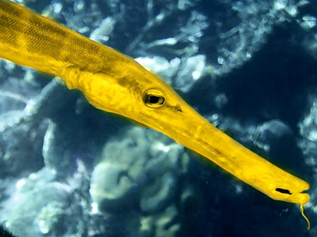 Aulostomus-chinensis en Maldivas, 2011